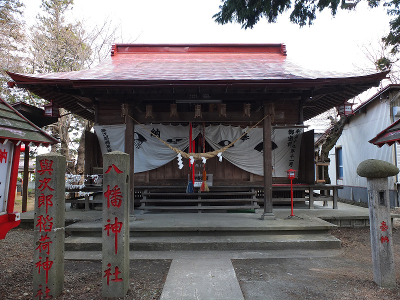 Yojiro Inari Shrine (與次郎稲荷神社)